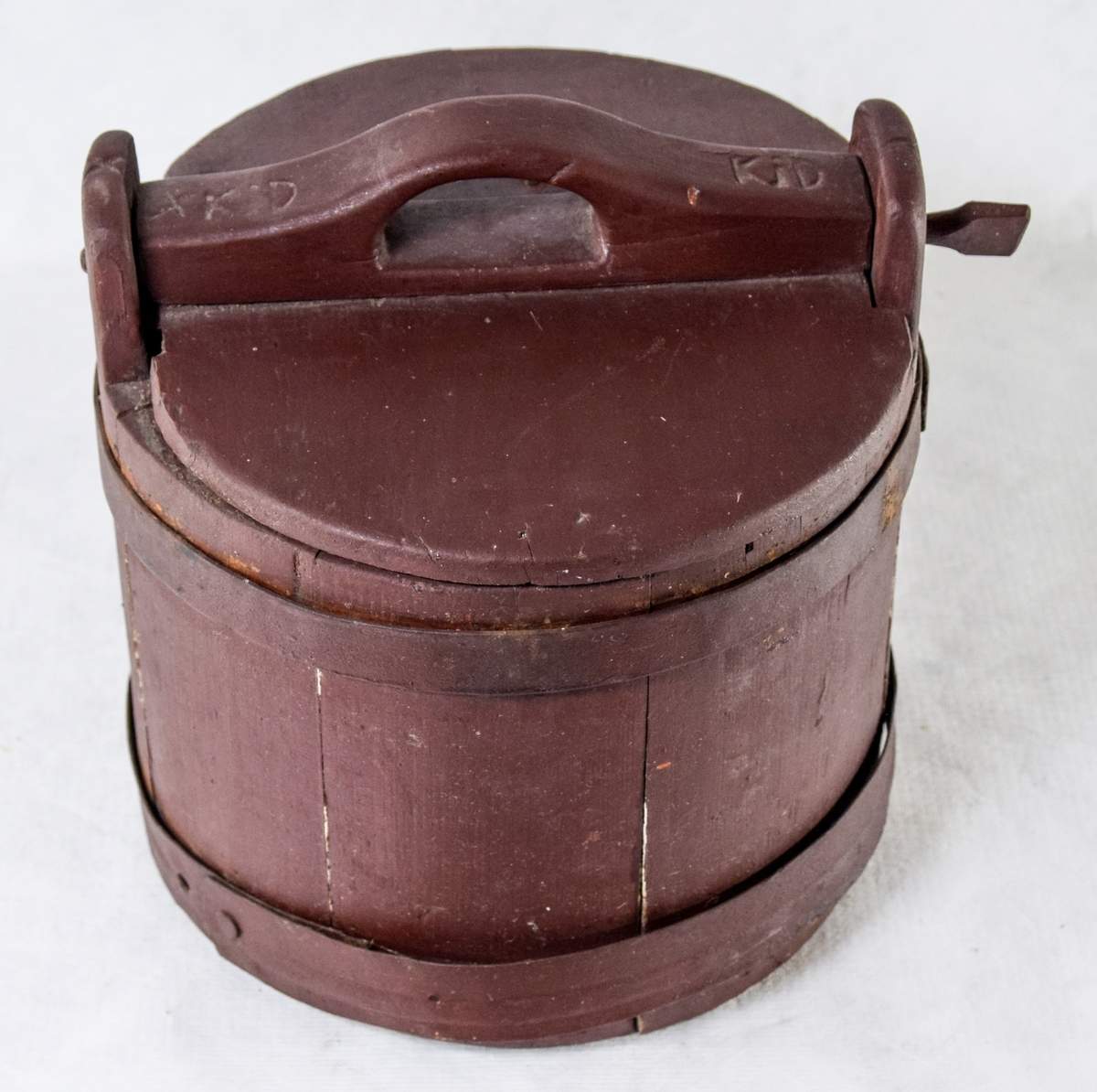 Butten er av gran, lagget, med to jerngjorder. Lokk med hank. Brunmalt svimerke på lokk og botn: «KID»